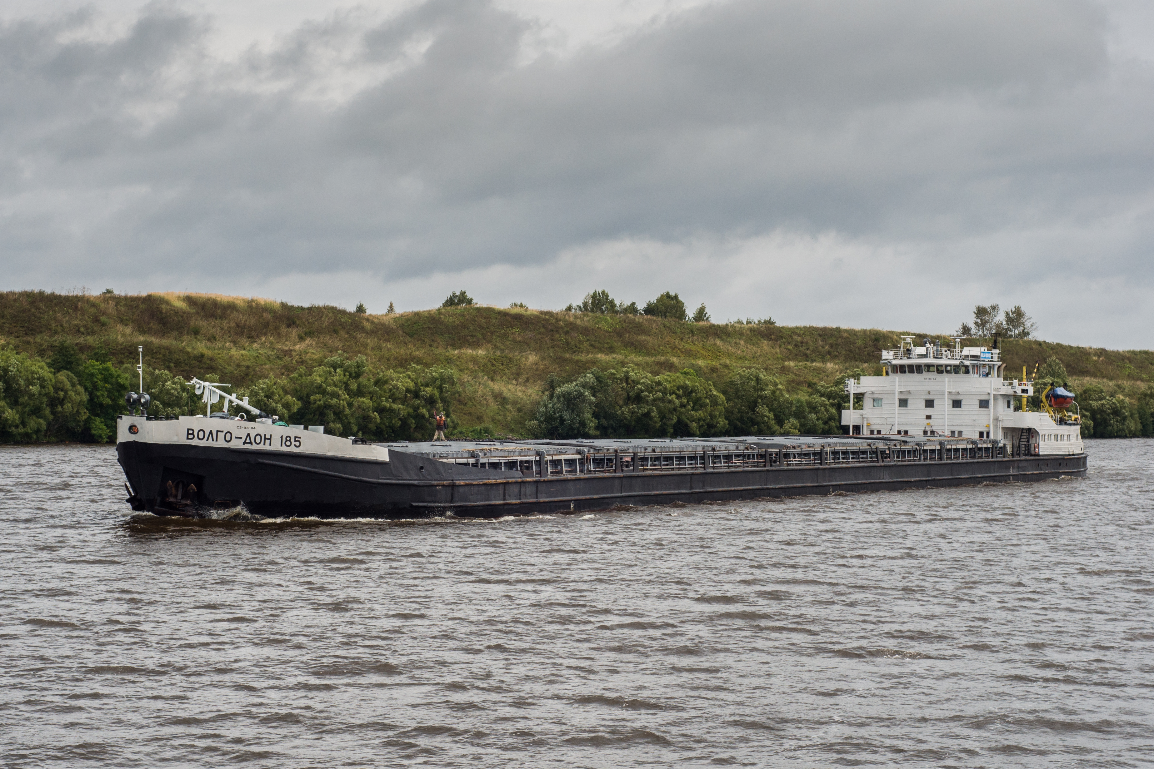 Теплоход "Волго-Дон-185", река Волга, Угличское водохранилище, г. Углич, близ шлюза 10-У. Снято с борта теплохода "Георгий Жуков".